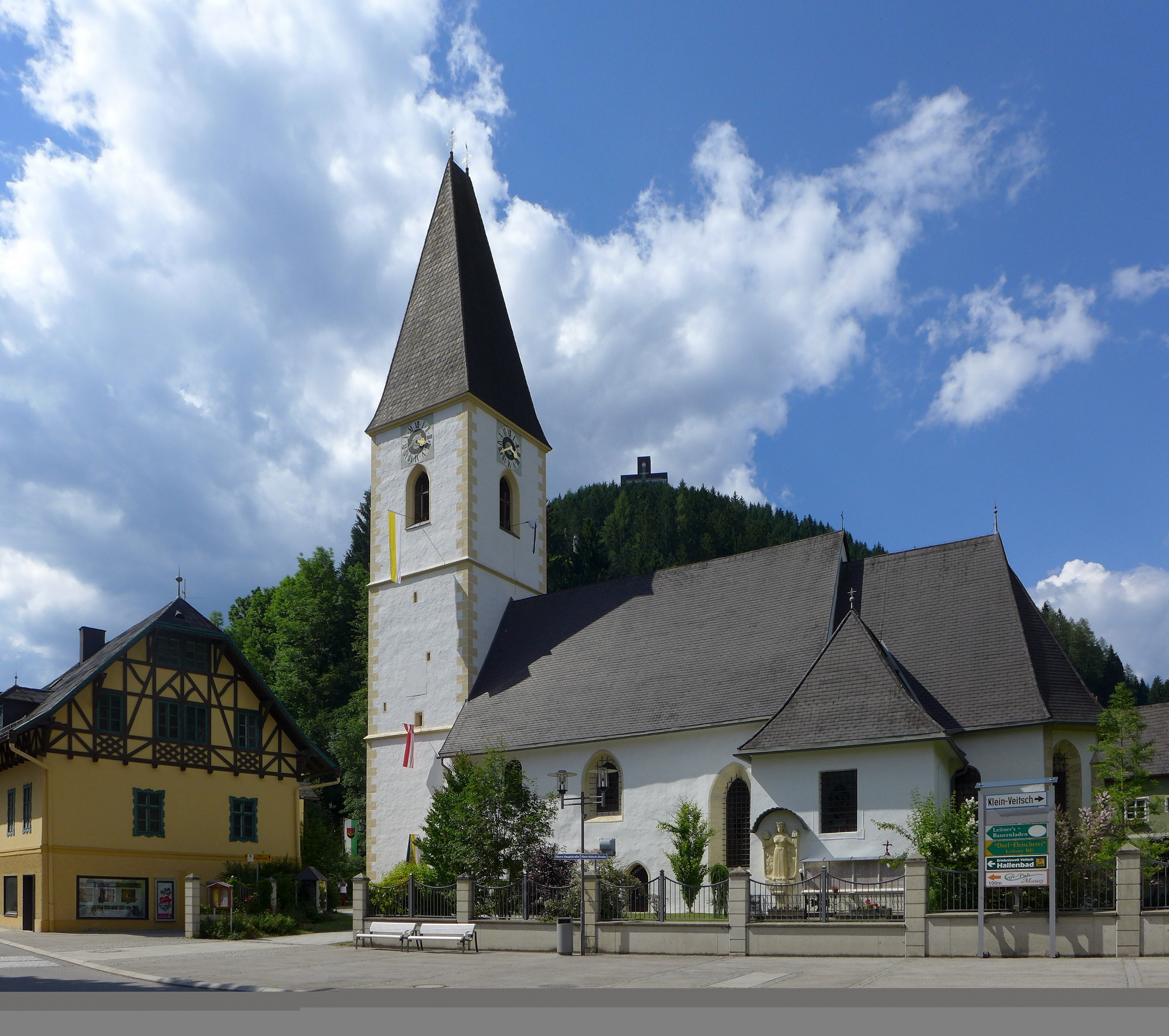 Veitsch - Pfarrkirche St. Vitus, Außenansicht